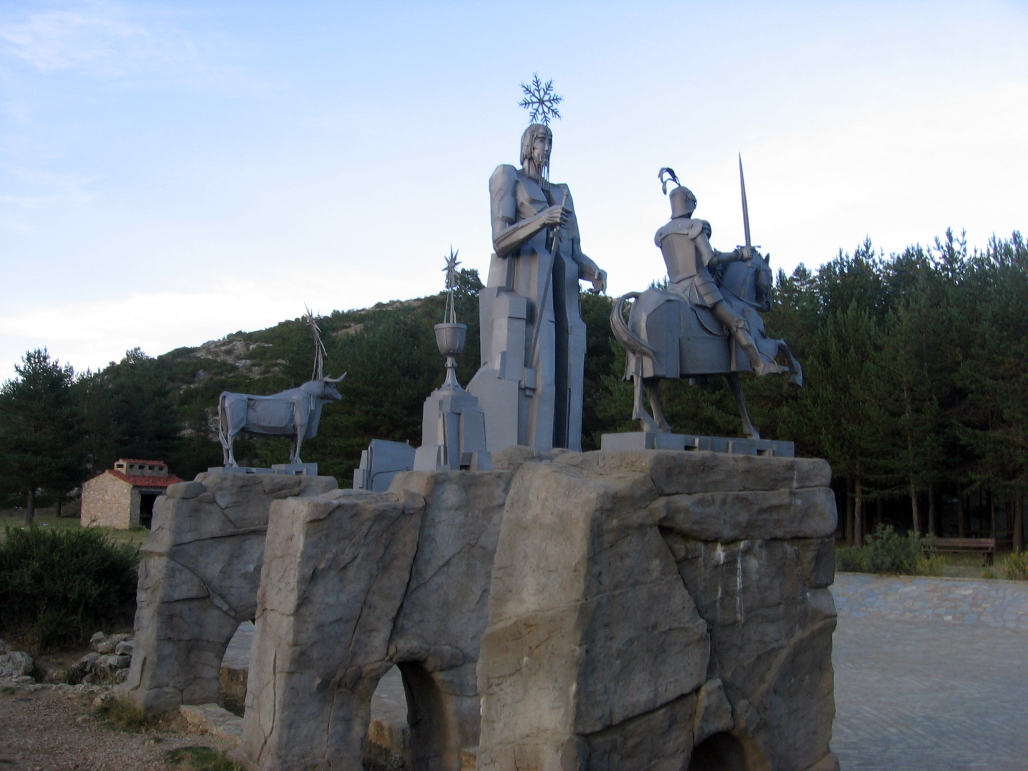 Monumento al nacimiento del río Tajo (1974), de José Gonzalvo, Frías de Albarracín, Teruel.